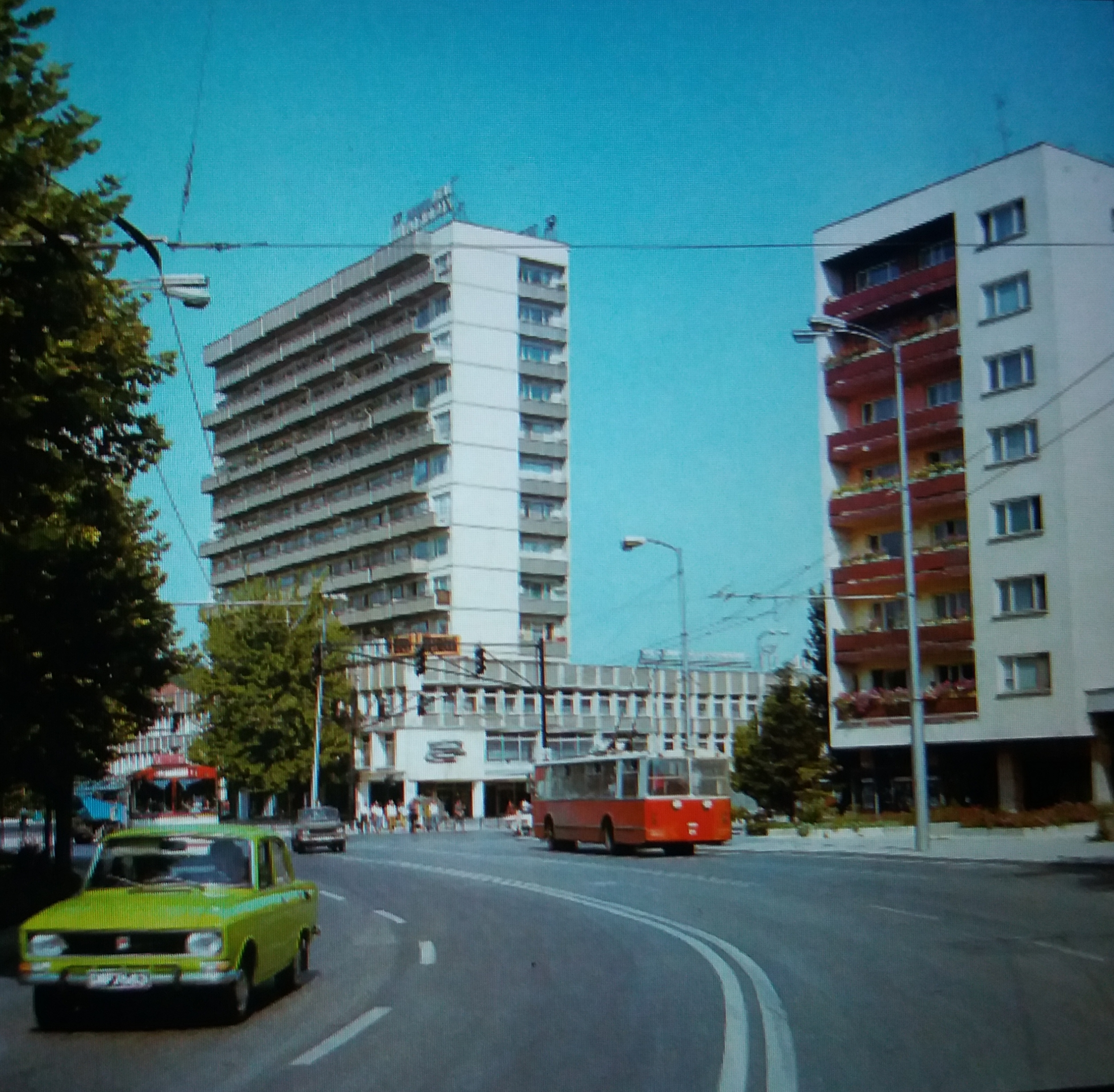 Съветски тролеи ЗиУ пред Дома на книгата през 80-те